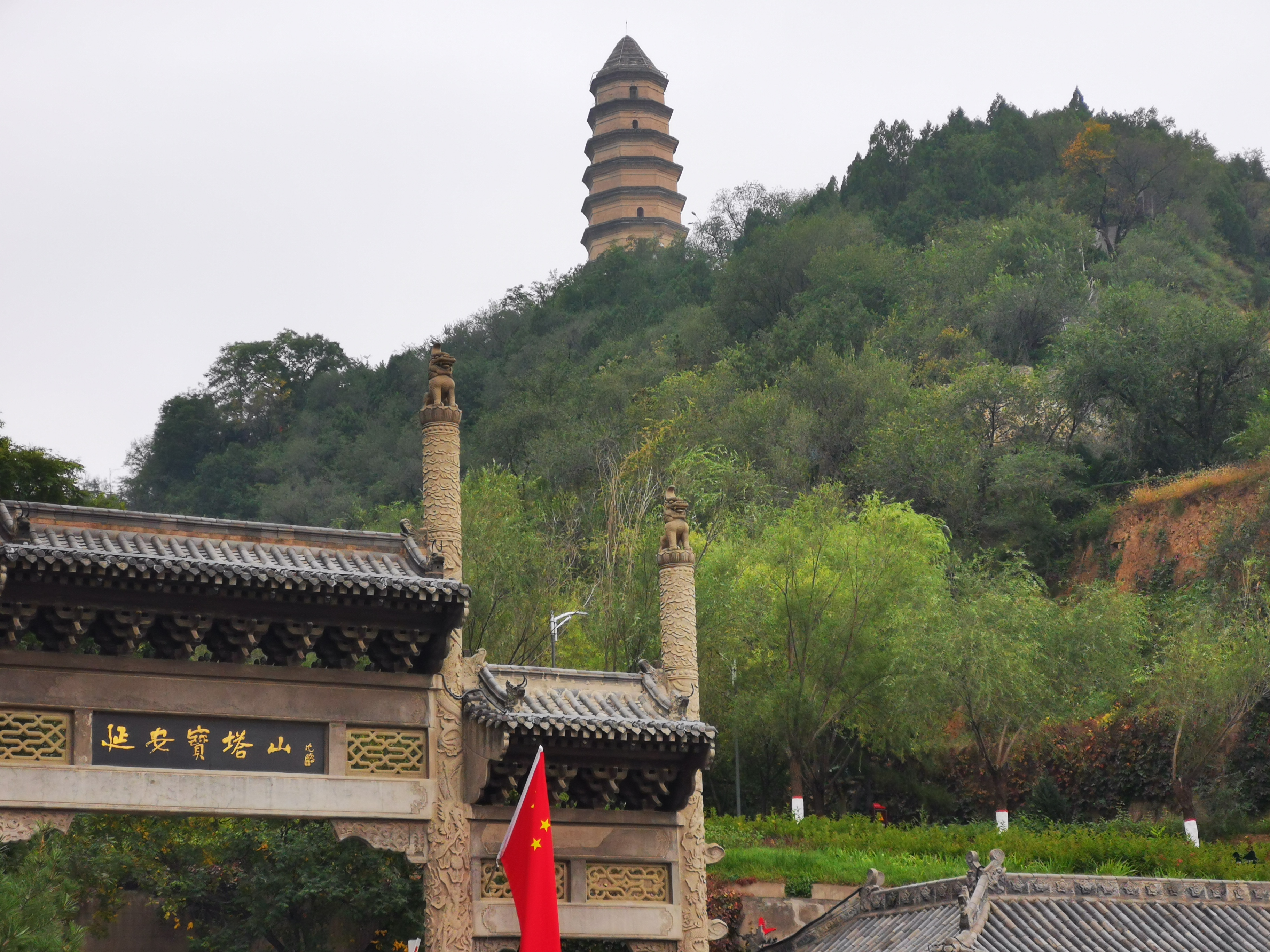 宝塔山